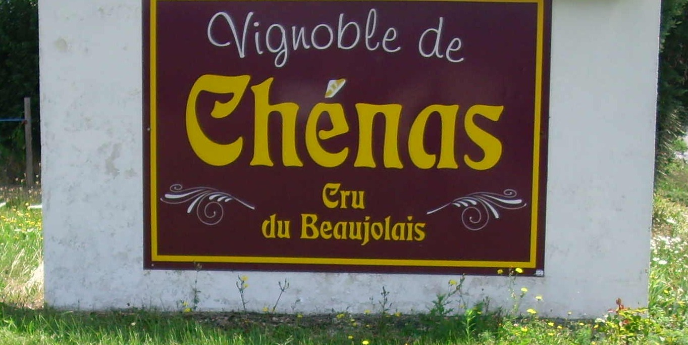 Plaque sur un mur décrivant le vignoble de Chénas (69)